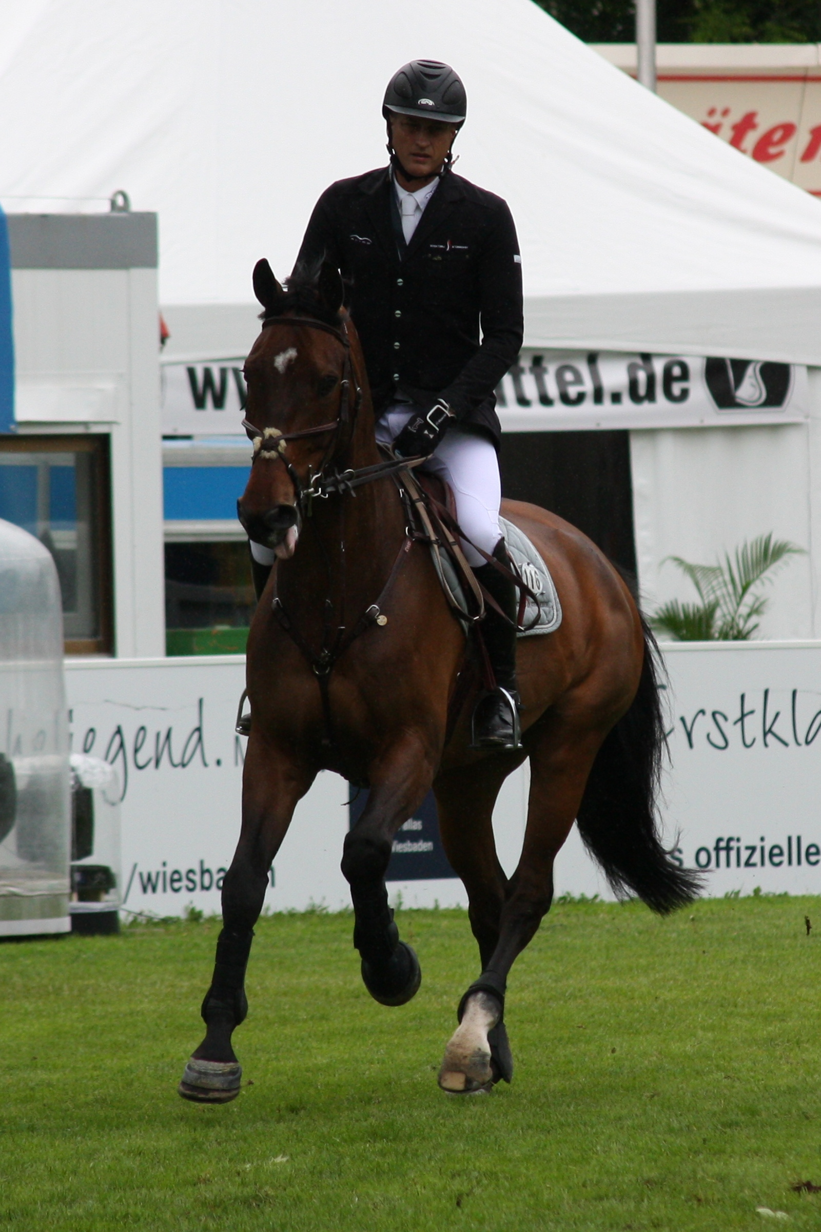 77. Internationanles Wiesbadener Pfingstunier 2013, CSI***** Eröffnungsspringen, Marc Houtzager auf Sterrehofs Tamino Personality rights warning Although this work is freely licensed or in the public domain, the person(s) shown may have rights that legally restrict certain re-uses unless those depicted consent to such uses. In these cases, a model release or other evidence of consent could protect you from infringement claims.